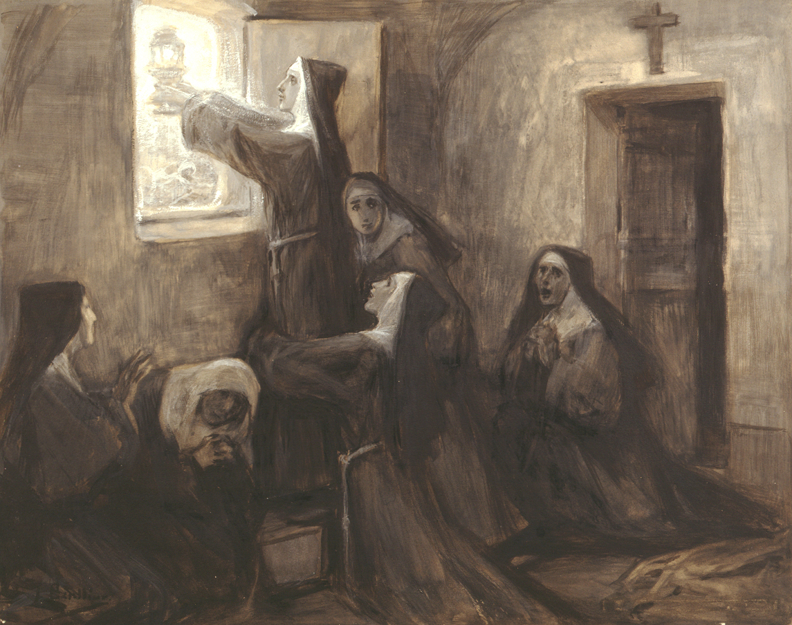 Clara triunfa de los sarracenos con solo mostrarles la sagrada forma.